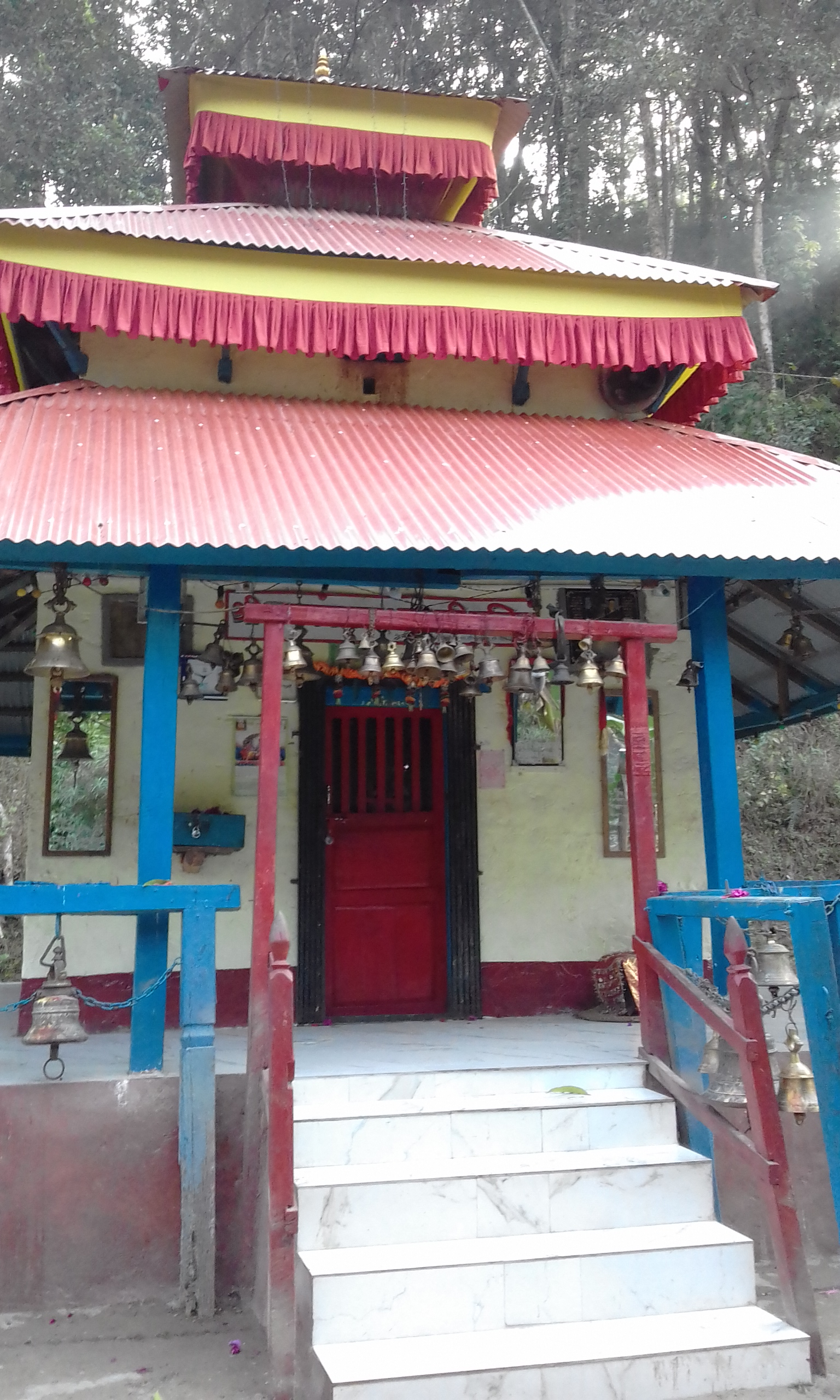 नेपाली: मनकामाना मन्दिर संखुवासभा